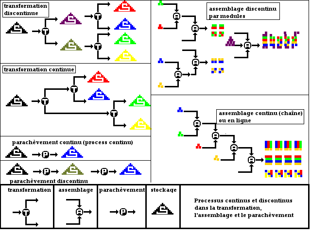 Discontinuité des trois types de processus industriels